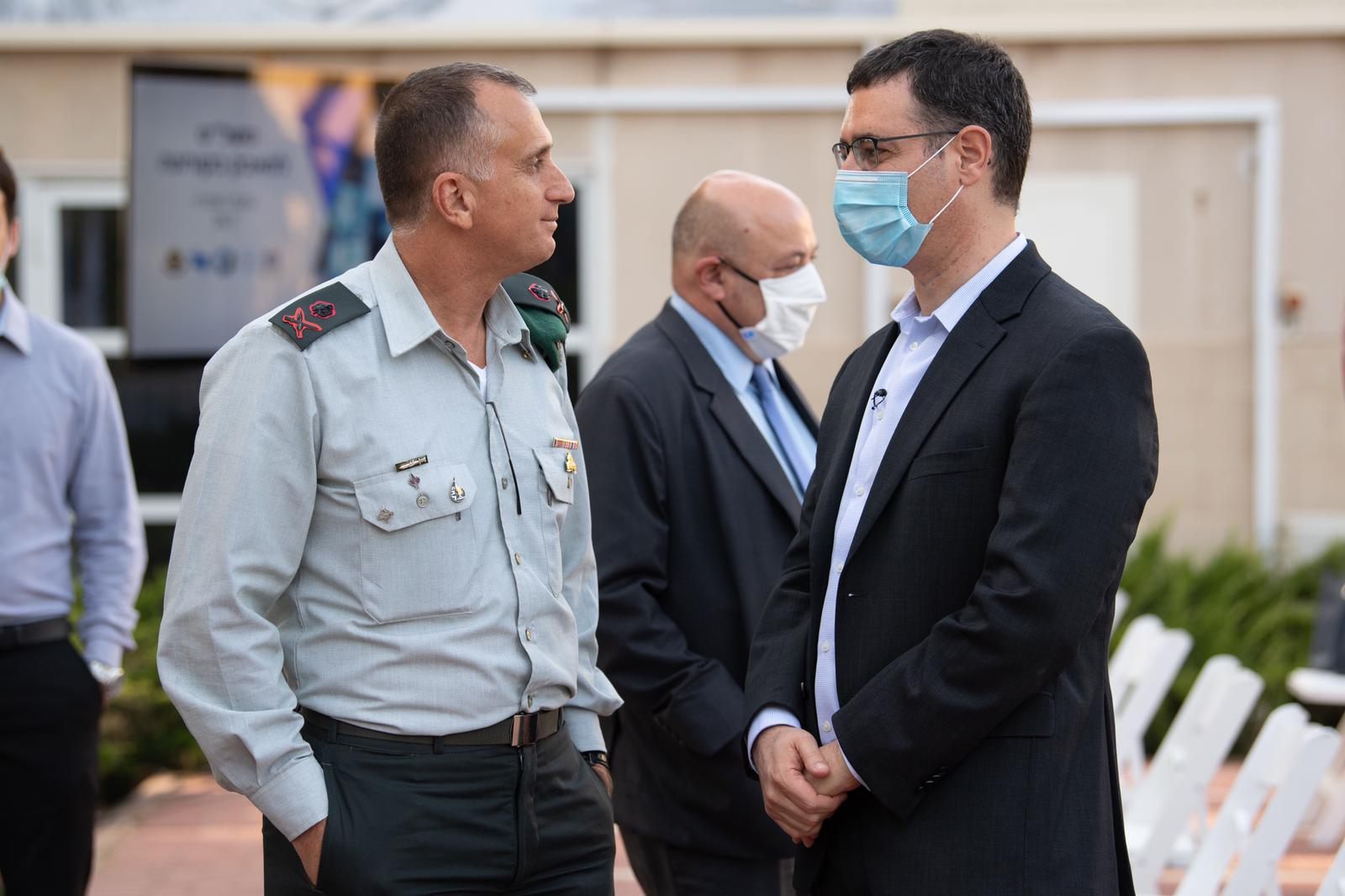 טקס סיום הפעילות במרכז השליטה הלאומי למאבק בקורונה , מימין לשמאל:מנכ"ל משרד הבריאות, משה בר סימן-טוב וראש אגף המודיעין, אלוף תמיר הימן מאחוריהם המשנה למנכ"ל משרד הבריאות , פרופ' איתמר גרוטו